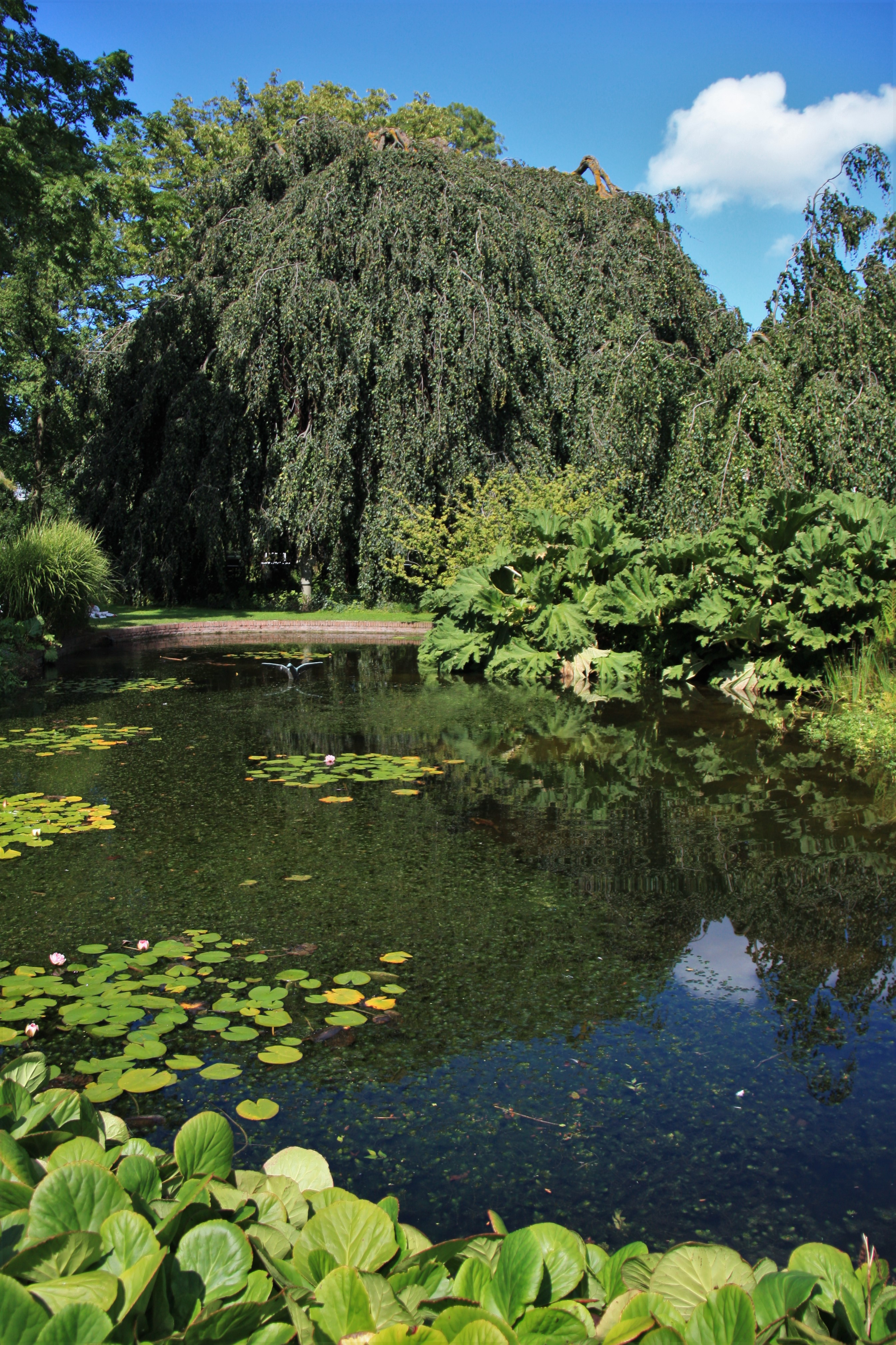 Став у Лейденському ботанічному саду